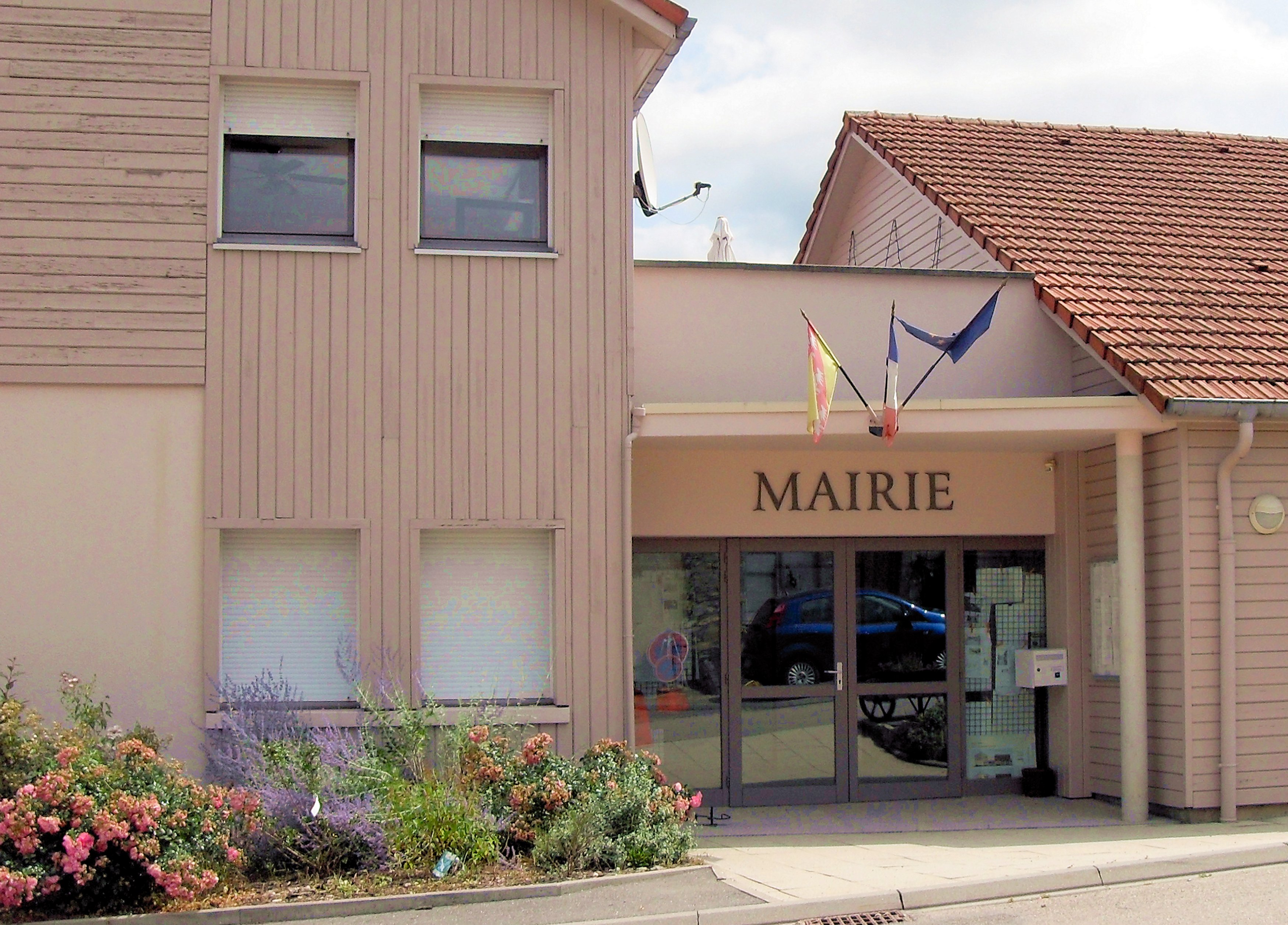 La mairie d'Ubexy